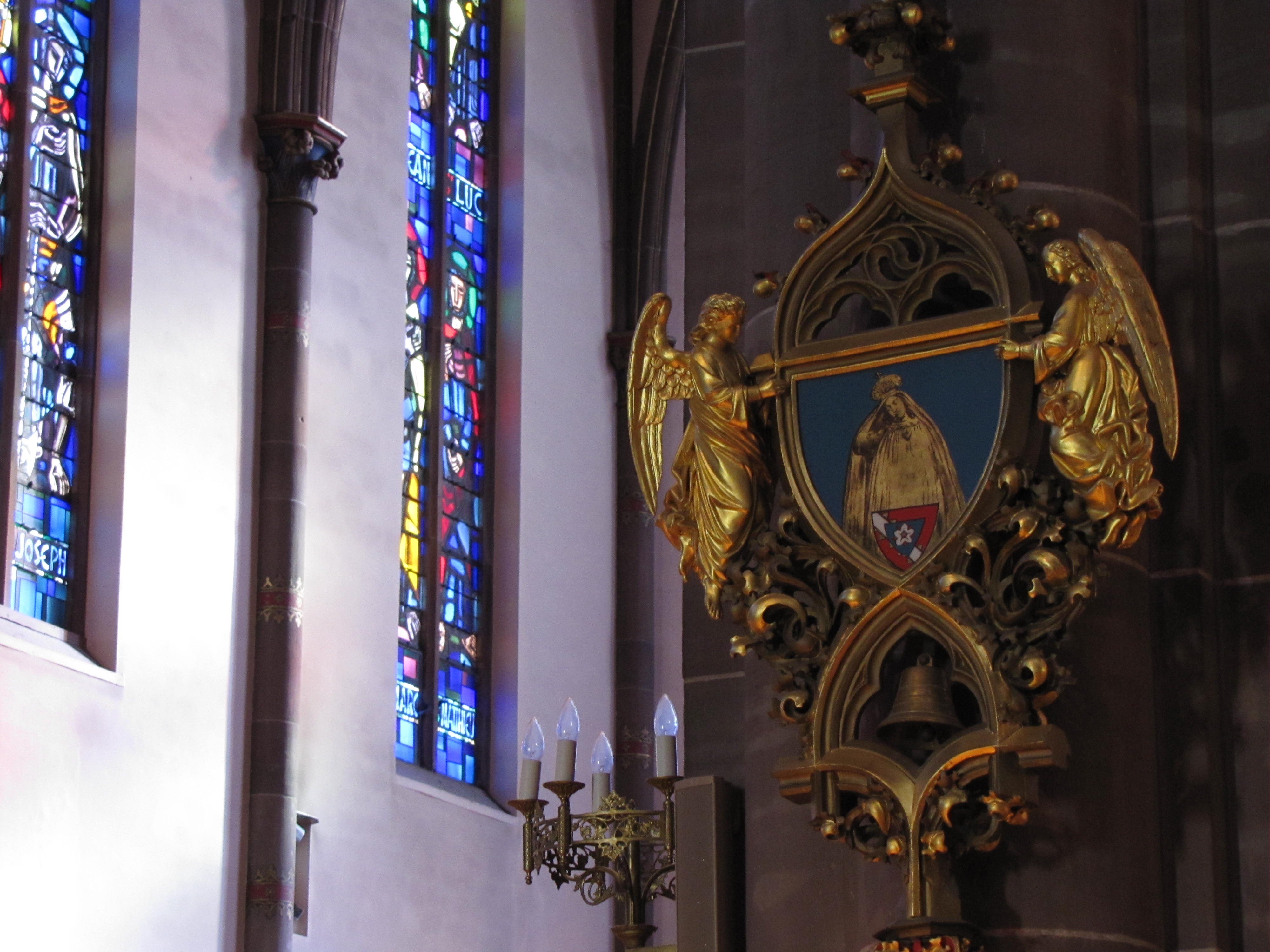 Alsace, Bas-Rhin, Haguenau, Basilique Notre-Dame-des-Douleurs de Marienthal (ancien Prieuré des Guillemites) (IA00062022). Tintinabule (insigne de basilique)